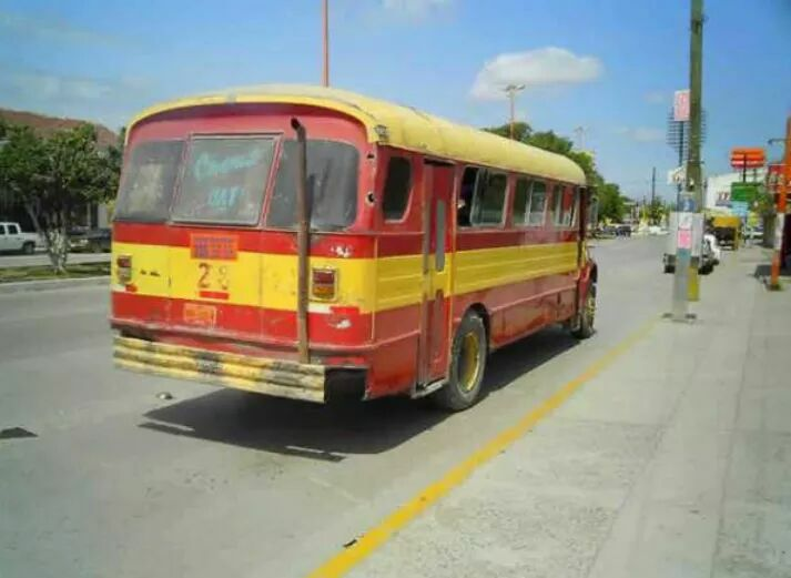 Antiguo transporte público de Ciudad Mante, Tamaulipas.